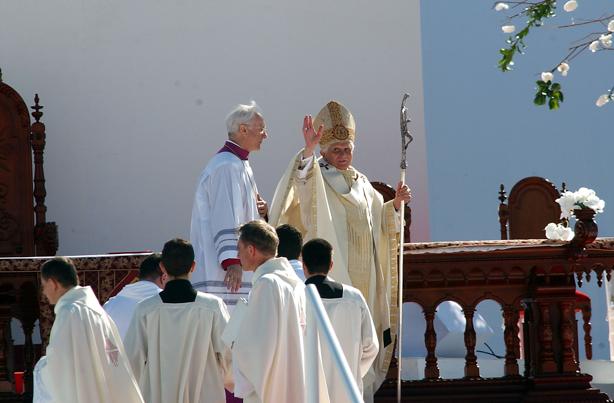 Cerimônia de canonização do frade brasileiro Frei Galvão celebrada pelo papa Bento XVI no Campo de Marte em São Paulo, Brasil.